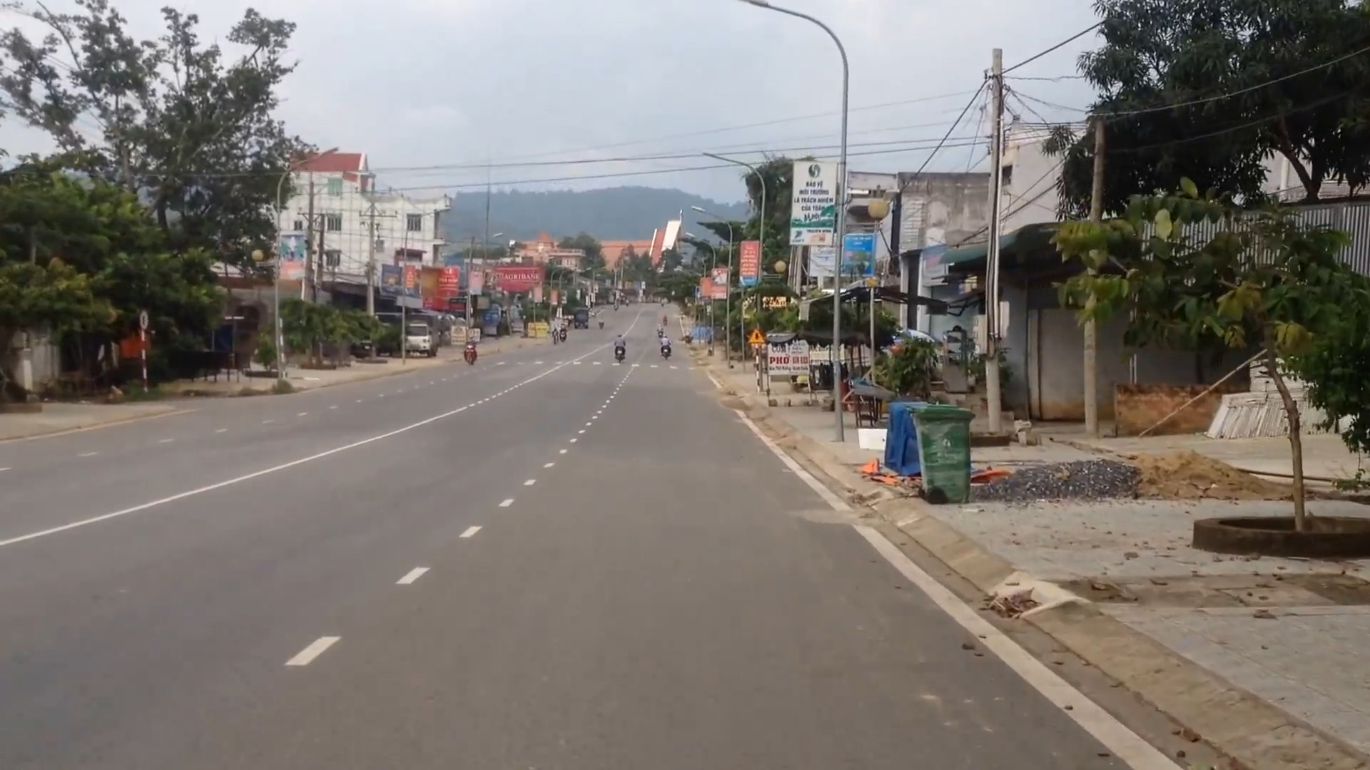 Hình được chụp tại Quốc lộ 20 thị trấn Madaguoi huyện Đạ Huoai tỉnh Lâm Đồng